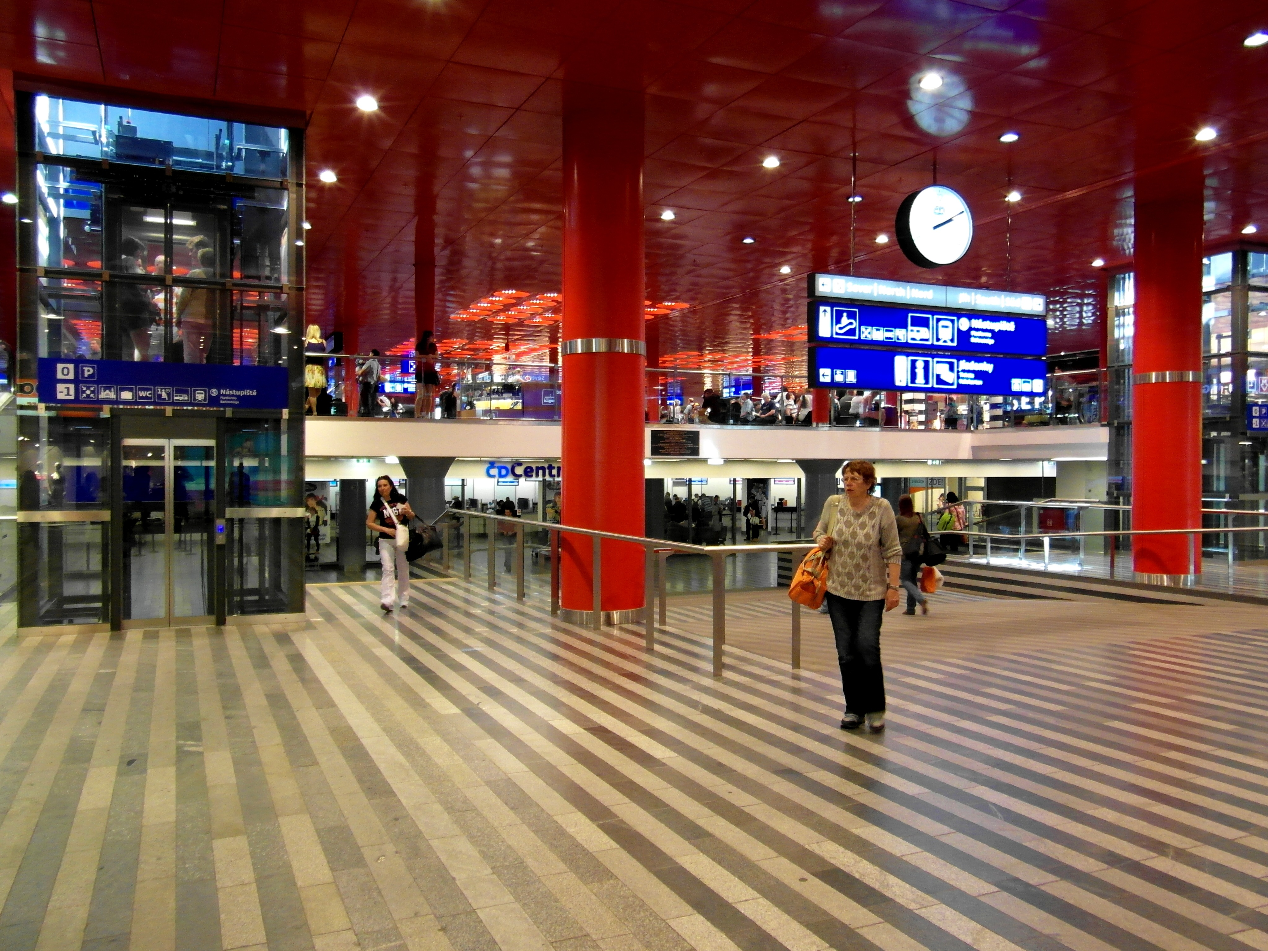 Praha - Hlavní Nádraží